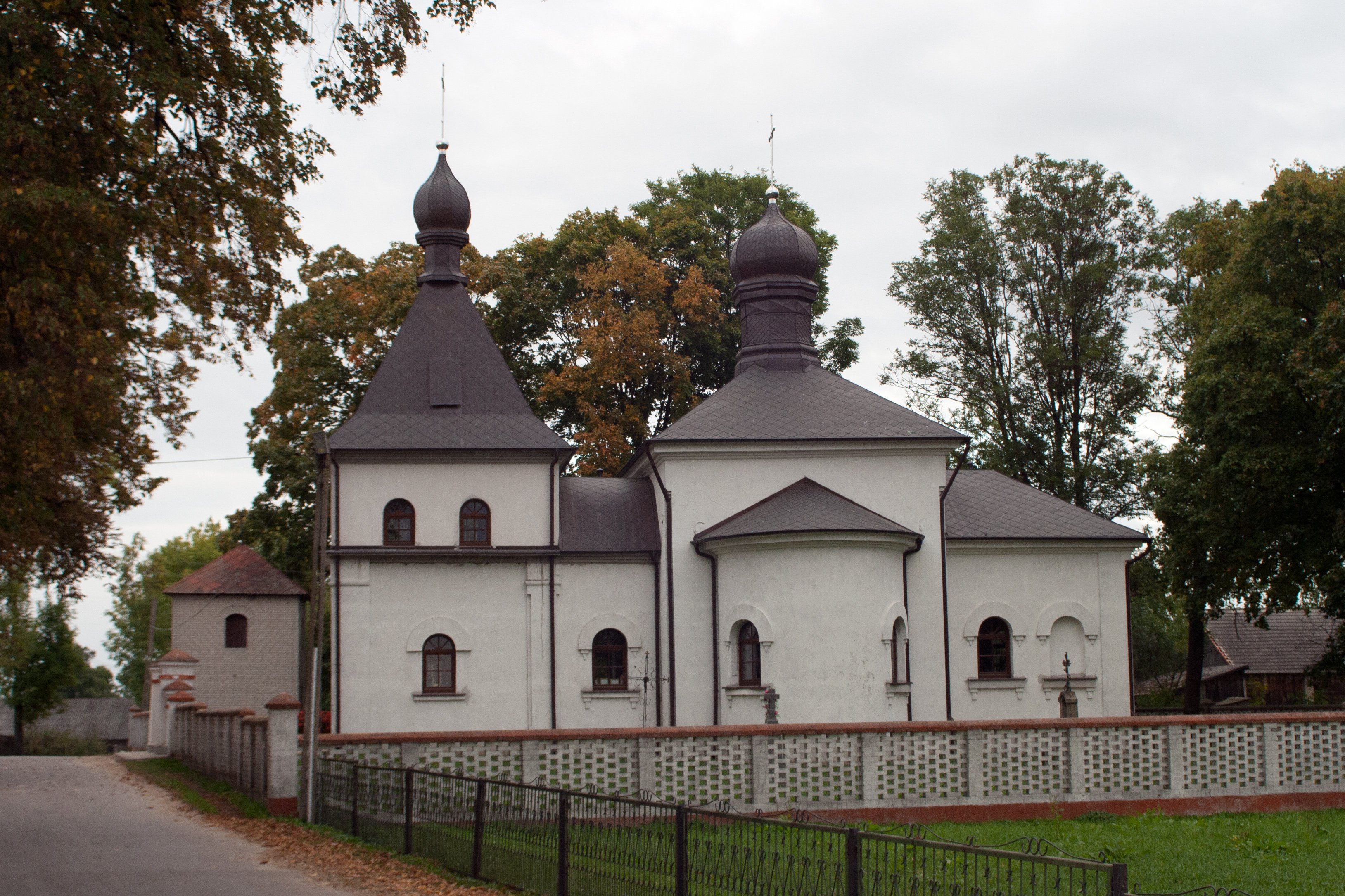 Narojki, Cerkiew prawosł. par. p.w. śś. Kosmy i Damiana, mur., 1865-1866